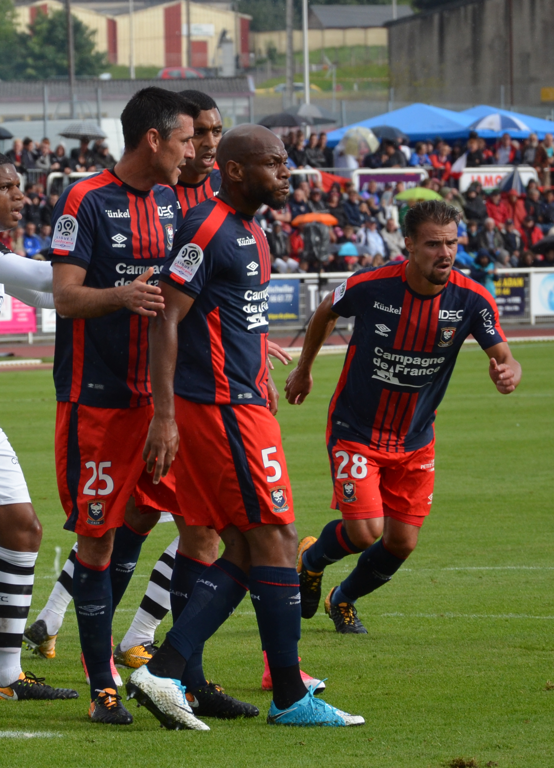 Photographie prise lors du match opposant le Stade rennais au SM Caen en match amical au stade Pierre-Compte de Vire le 22 juillet 2017. Ici, des joueurs caennais sur un coup de pied arrêté.